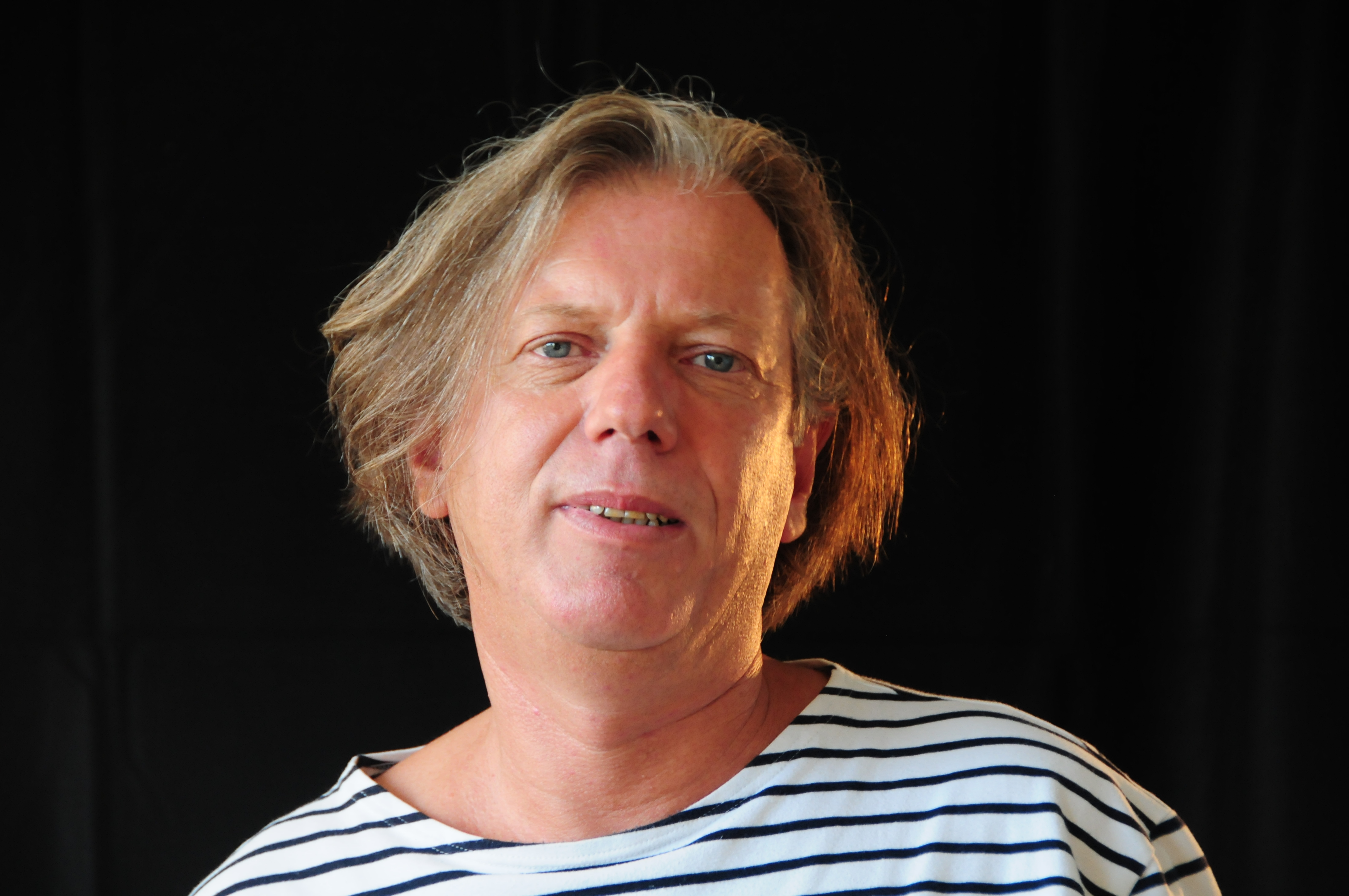 Fotoshooting mit Gazmend Freitag